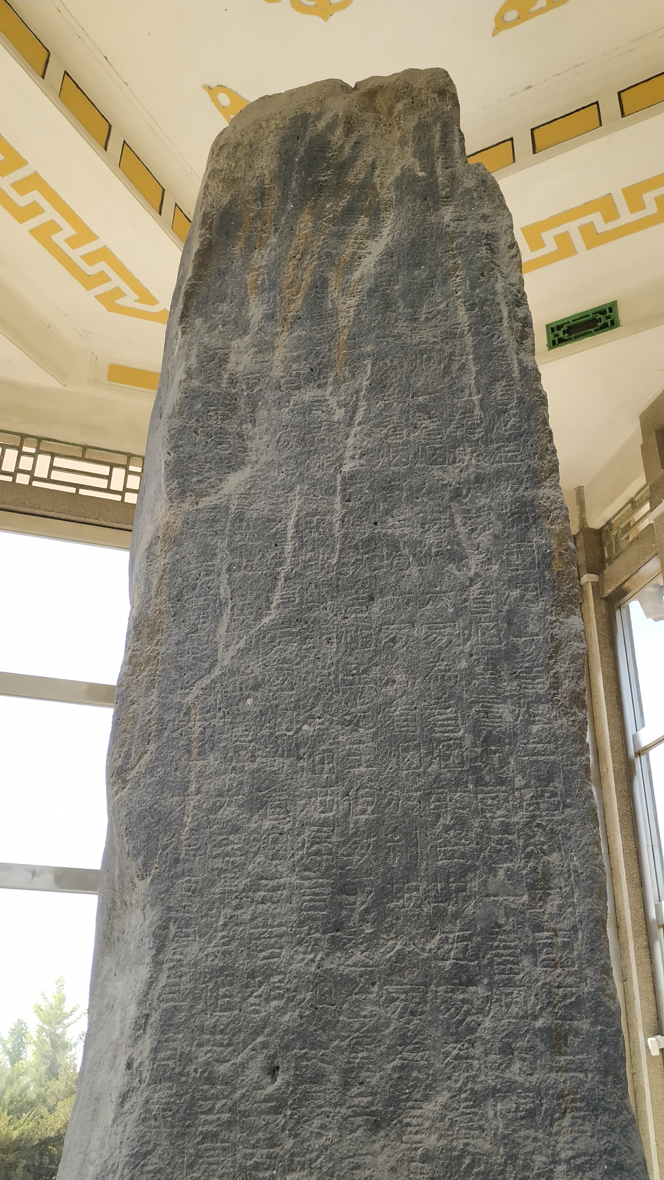 中文（中国大陆）: 好太王碑1